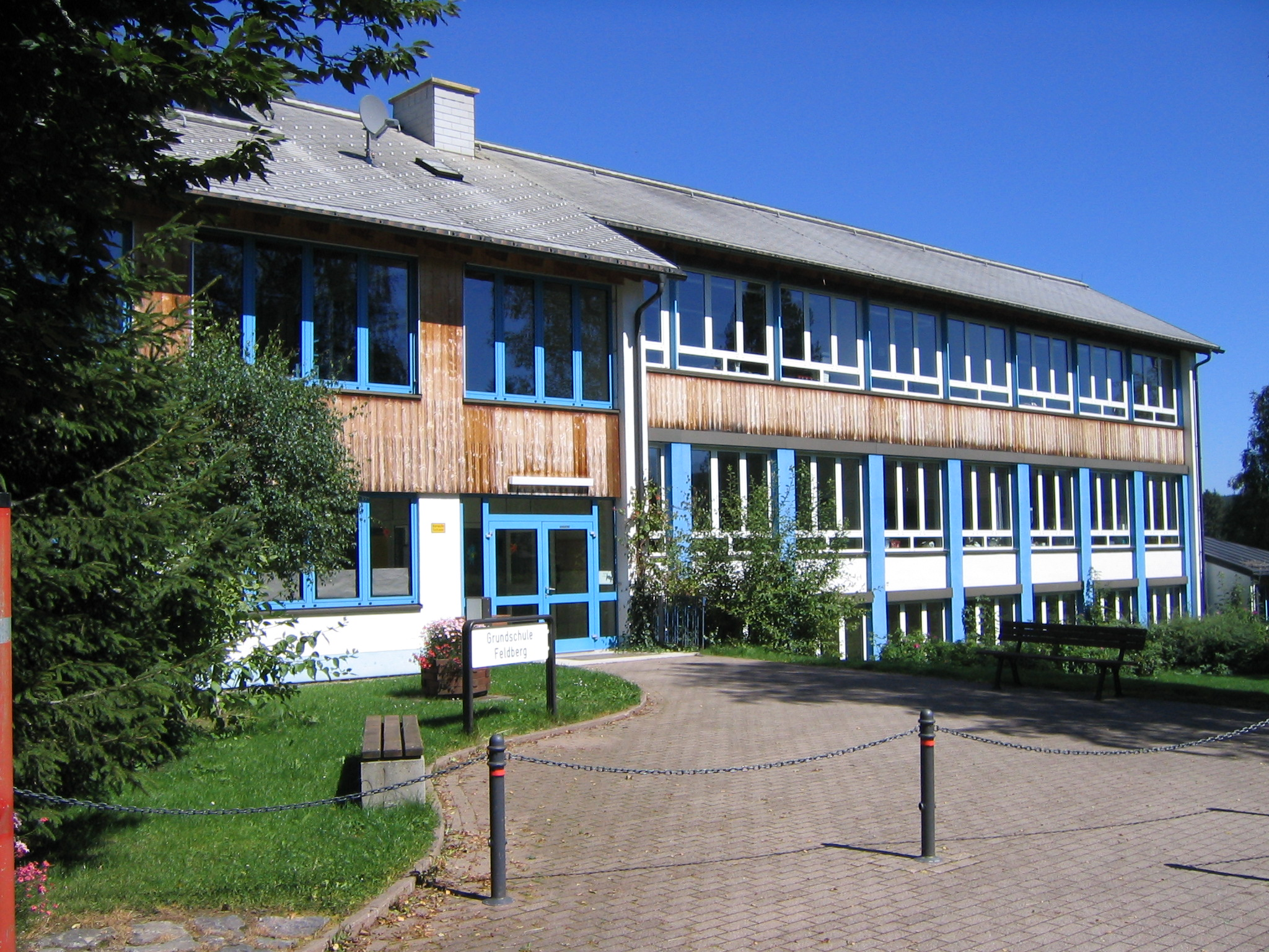 Grundschule Feldberg-Altglashütten